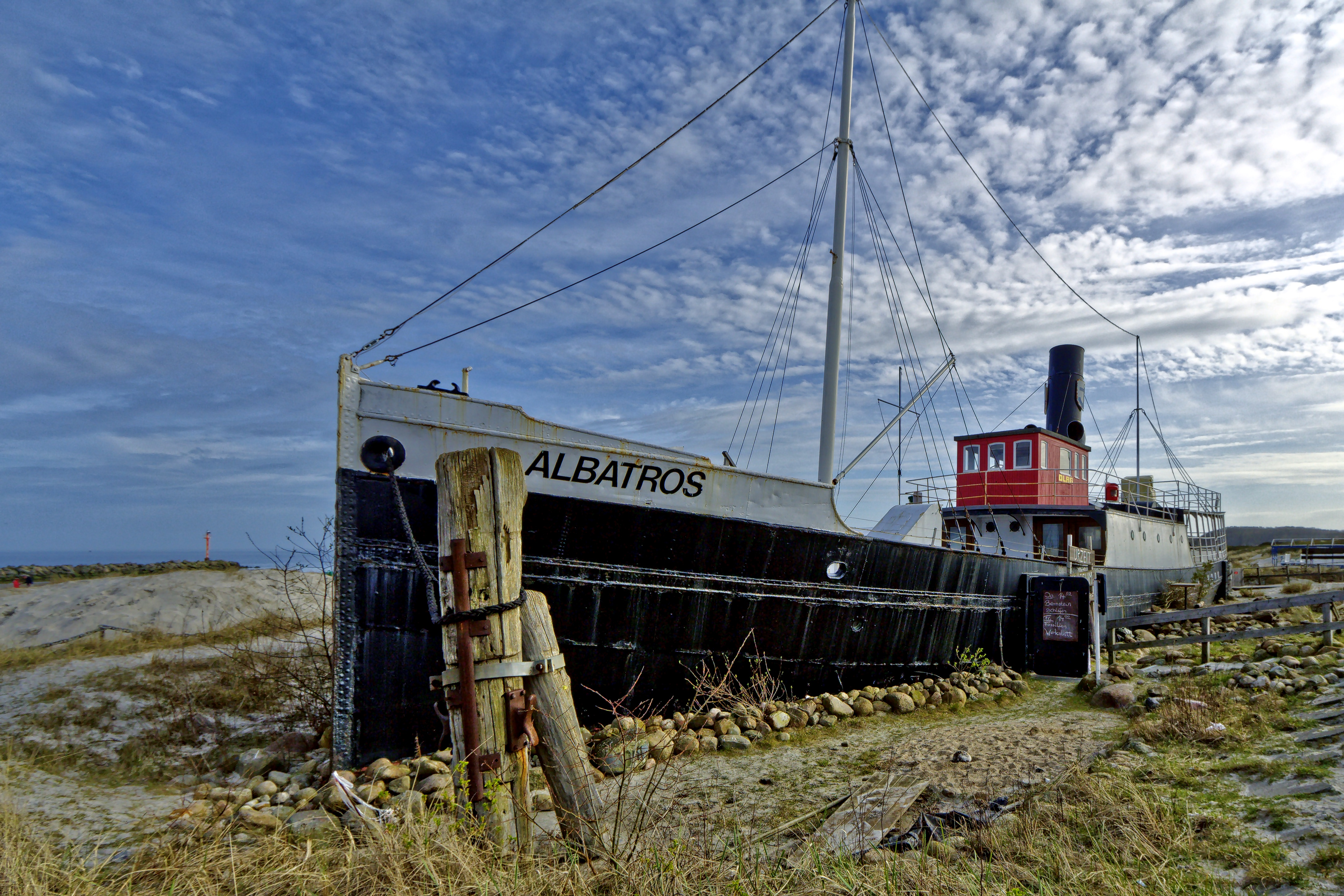 Damp; Dampfschiff Albatros; Urzeitmuseum